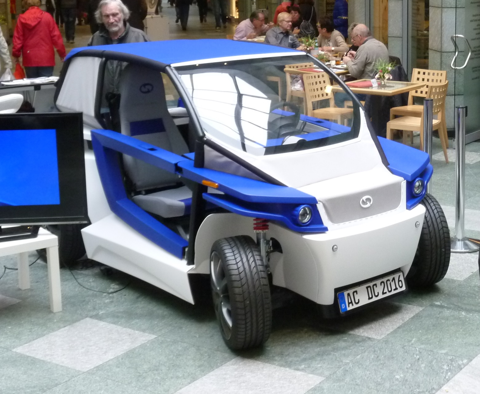 1. Prototyp StreetScooter Leichtelelektromobil